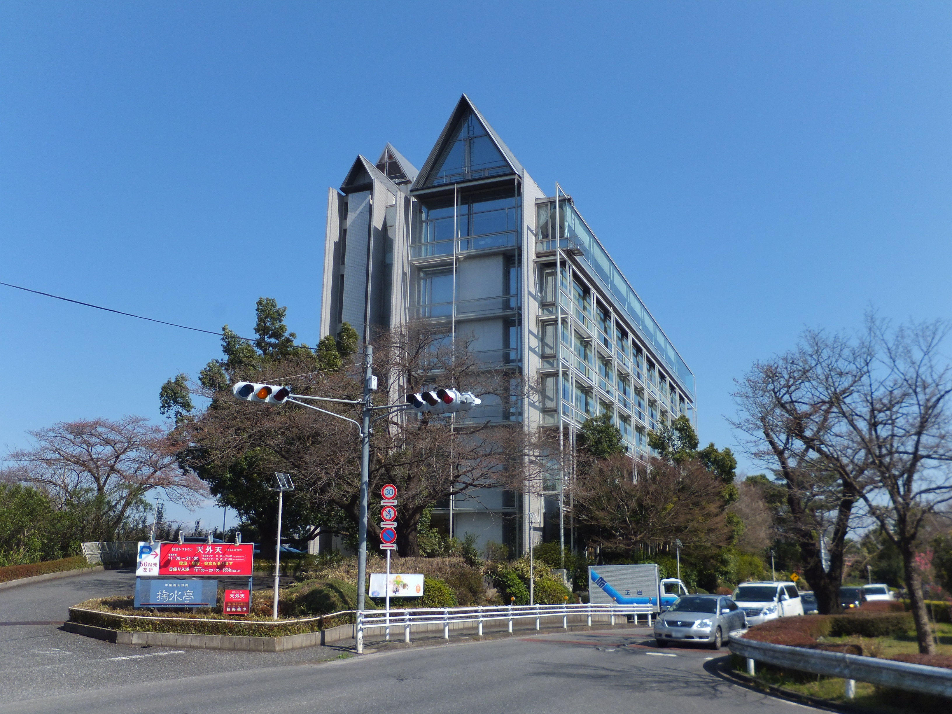 西武グループの中国割烹旅館「掬水亭」（埼玉県所沢市） 建築の設計は池原義郎による